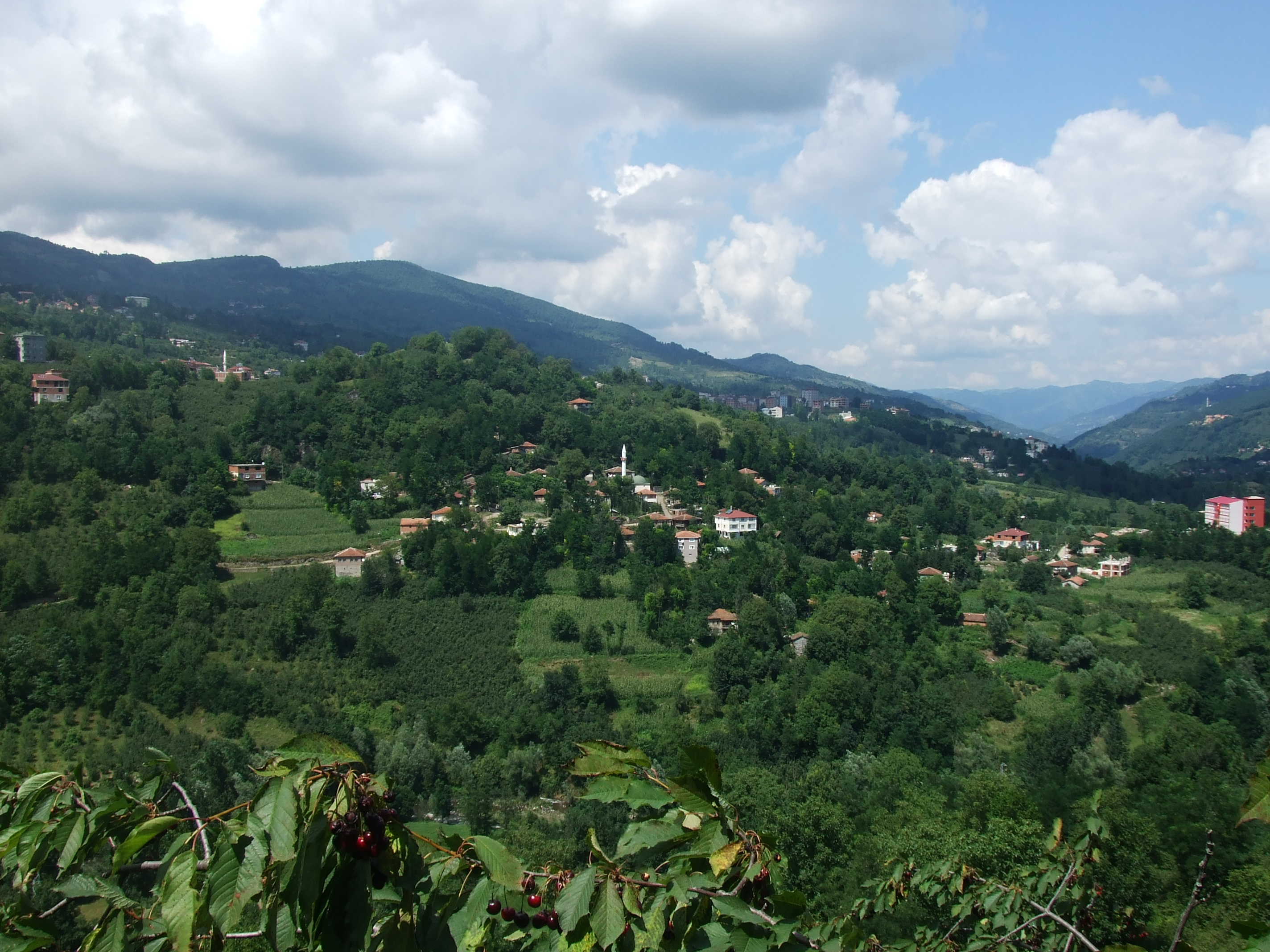 Ordu iline bağlı Aybastı ilçesinden bir görünüm.